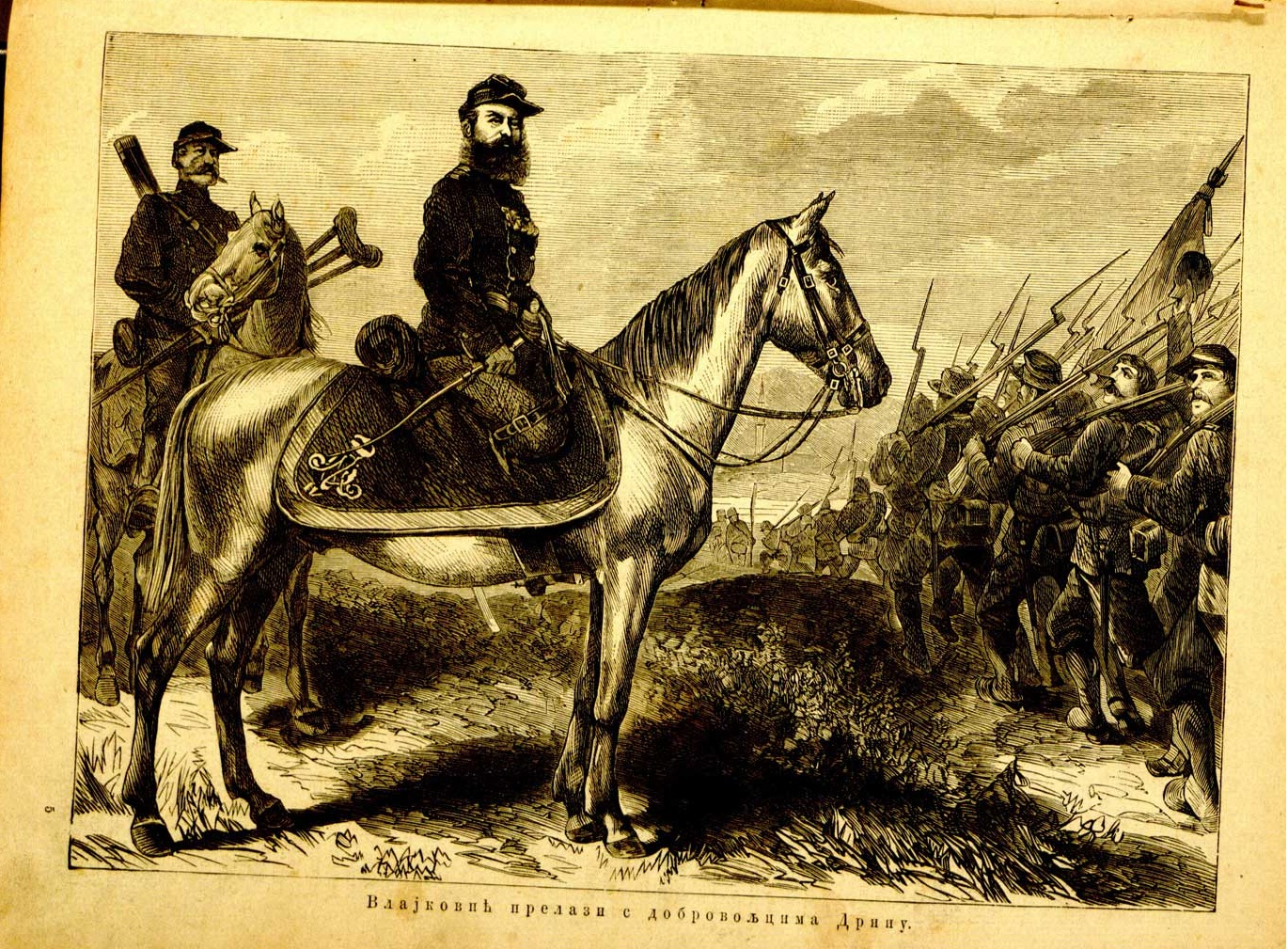 Vlajković überquert den Fluss Drina mit Freiwilligen (1877).